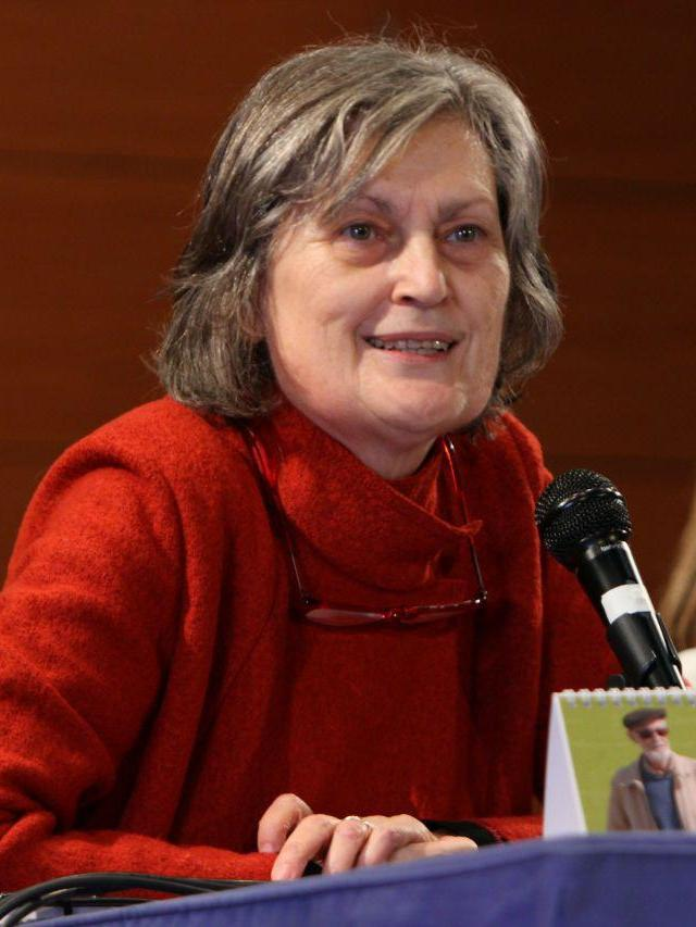 Fue vecino de Chamberí hasta su muerte en 2013 y en su casa de Cea Bermúdez escribió buena parte de su obra. El escritor de La sonrisa etrusca, El río que nos lleva o La vieja sirena pone nombre a dos espacios del distrito. Los jardines colindantes al centro cultural Galileo y la sala de exposiciones se llaman desde hoy “José Luis Sampedro”.